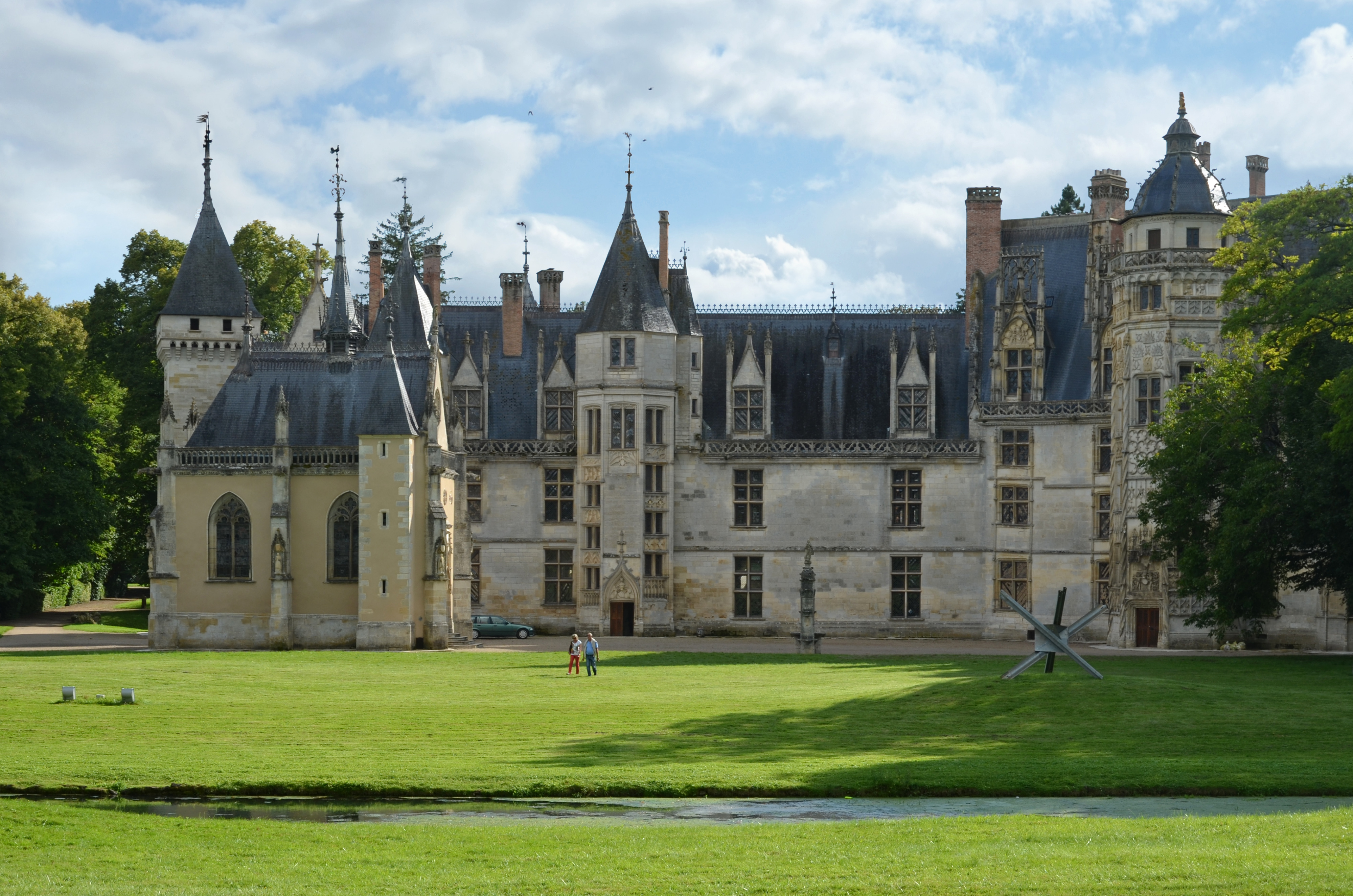 Château de Meillant, Cher, 2014. .